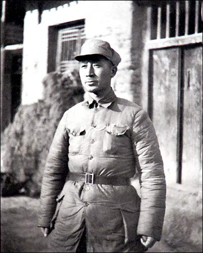 抗日战争期间的薄一波